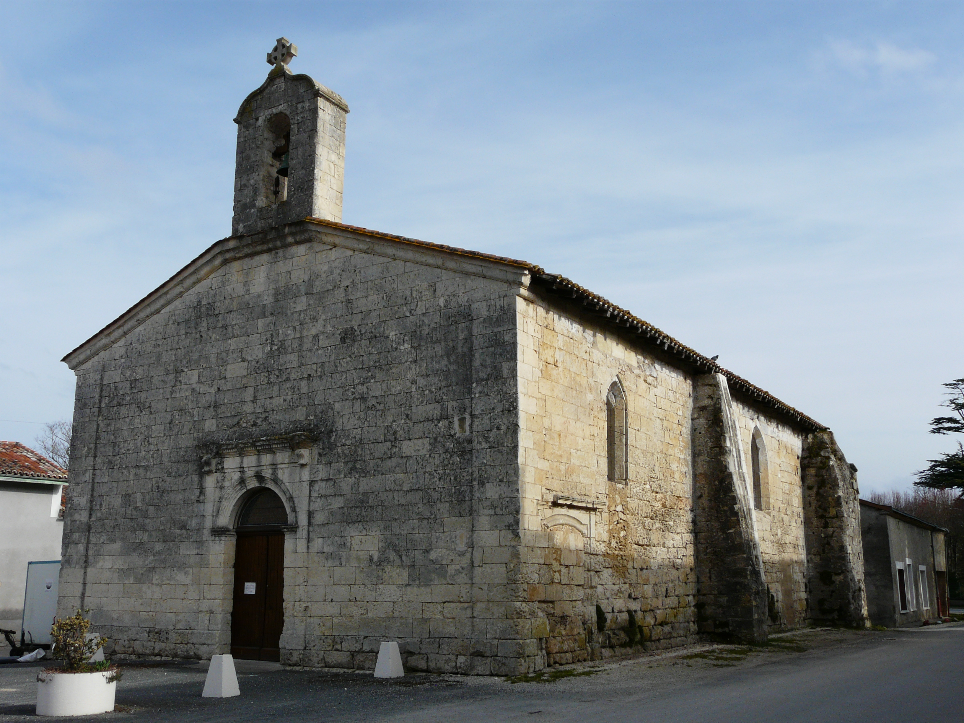 L'angle sud-ouest de l'église Saint-Louis de Saint-Louis-en-l'Isle, Dordogne, France.